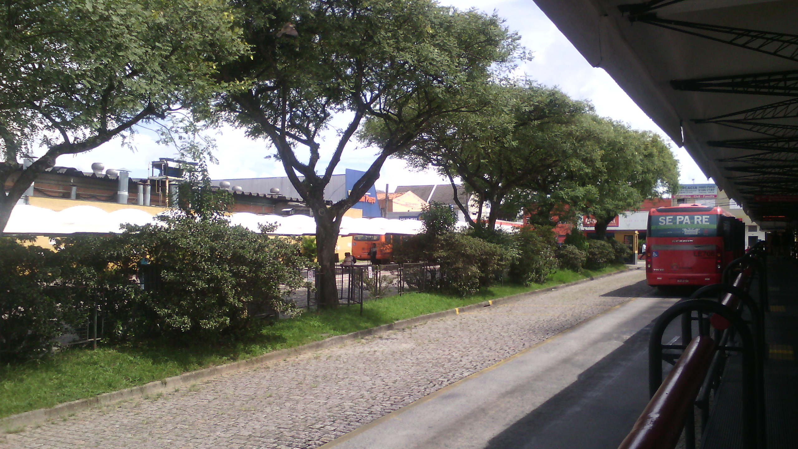 Imagem parcial do Terminal Centenário, integrante do sistema integrado de transporte curitibano.